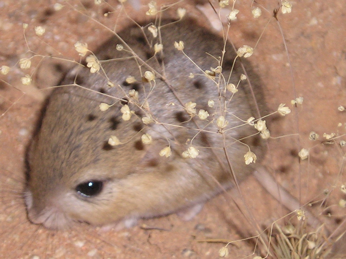 Desmodillus auricularis